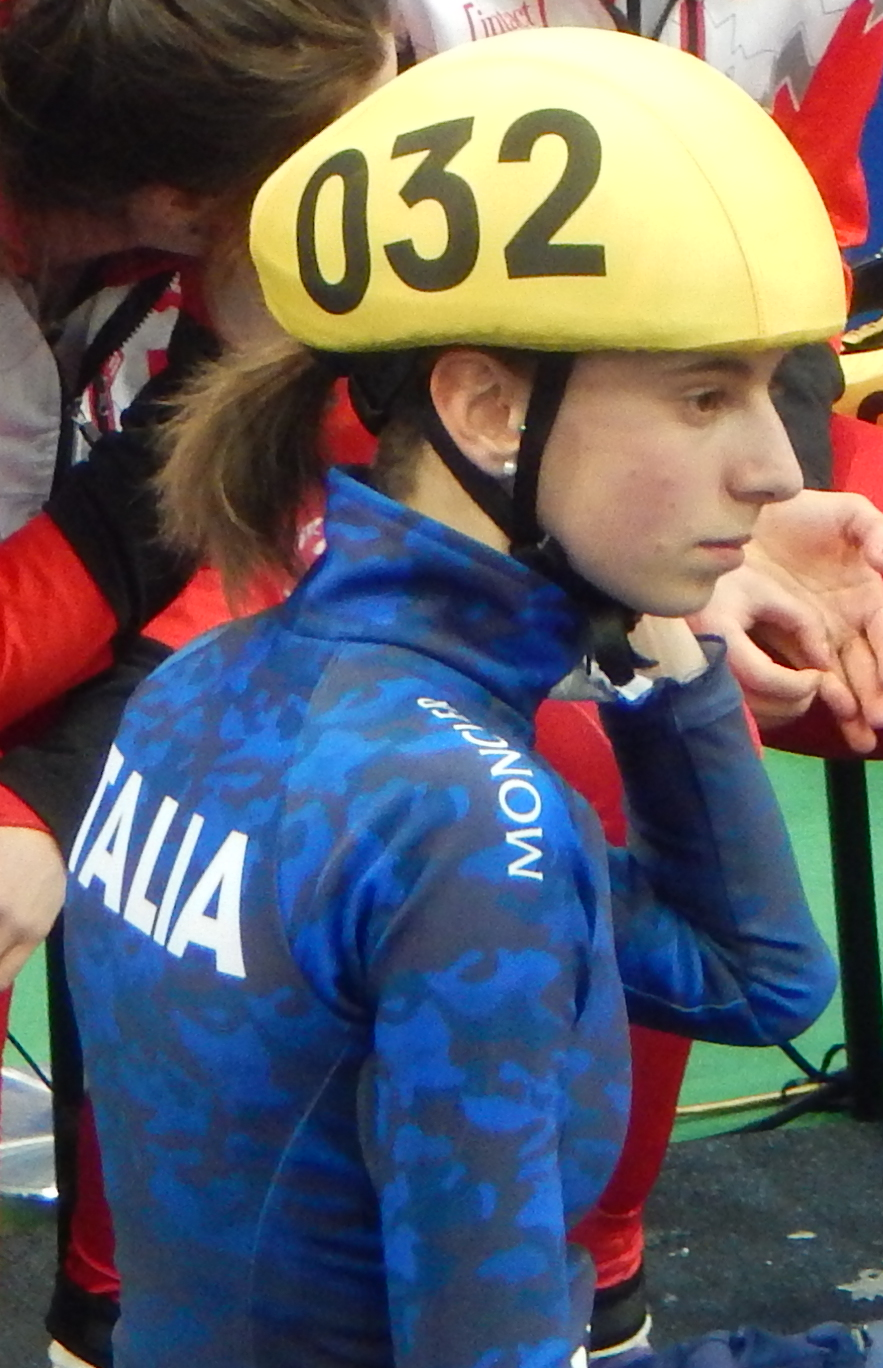 Итальянская шорт-трекистка Лючия Перетти. Чемпионат мира по шорт-треку 2015 в Москве Эстафета. Женщины. Полуфинал.